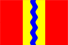 Проекты флага Омской области